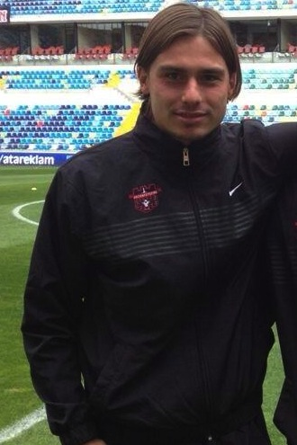 Erman Bulucu